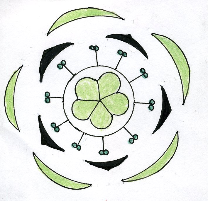 bloemdiagram Oxalis, Oxalis flower diagram